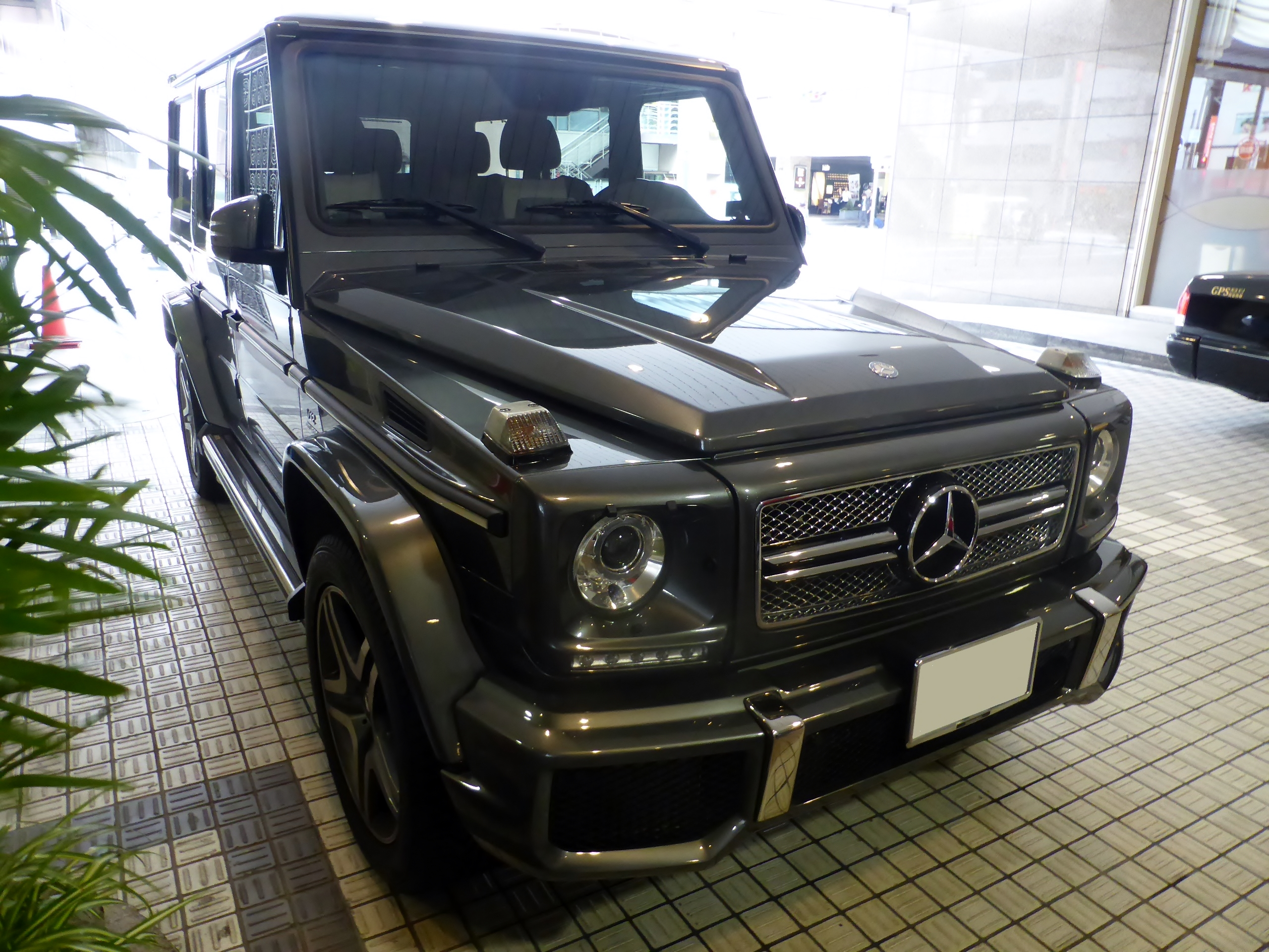 W463型メルセデス・ベンツG65 AMGをフロントから撮影。